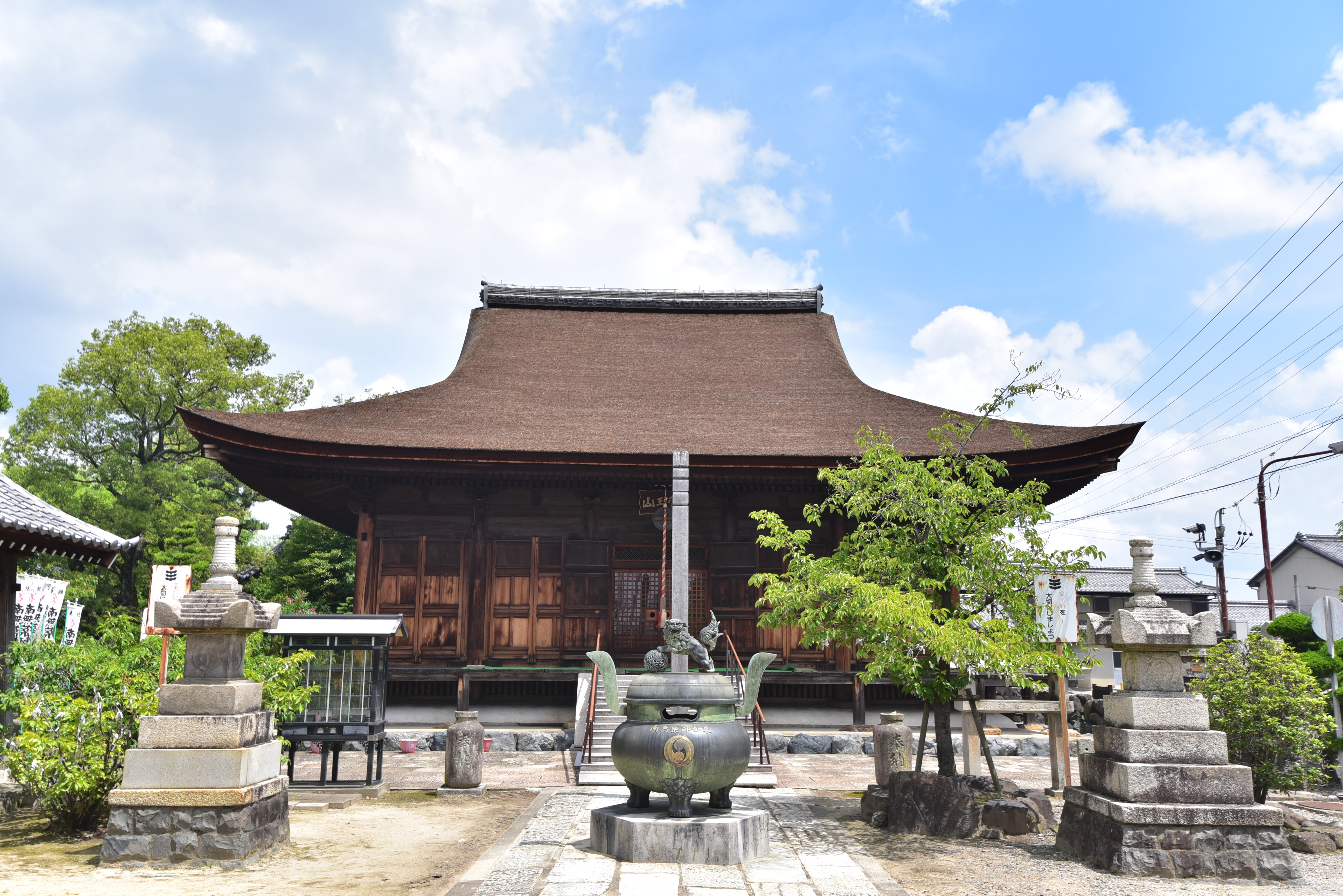 高田寺本堂